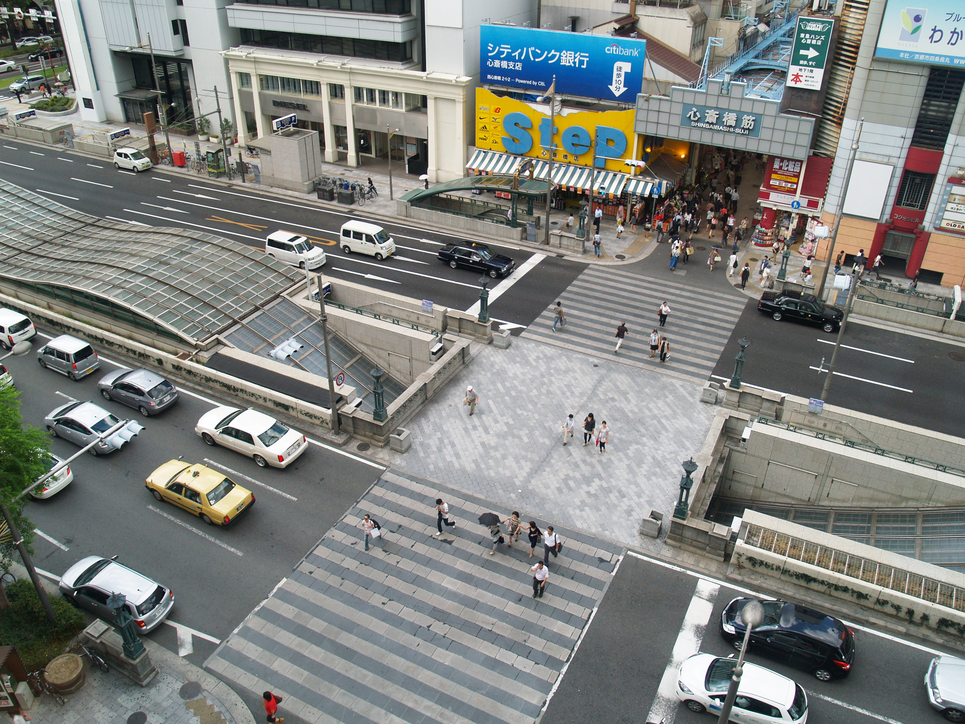 クリスタ長堀の上に復元された心斎橋。ラ・ポルト心斎橋5Fの歯科から。